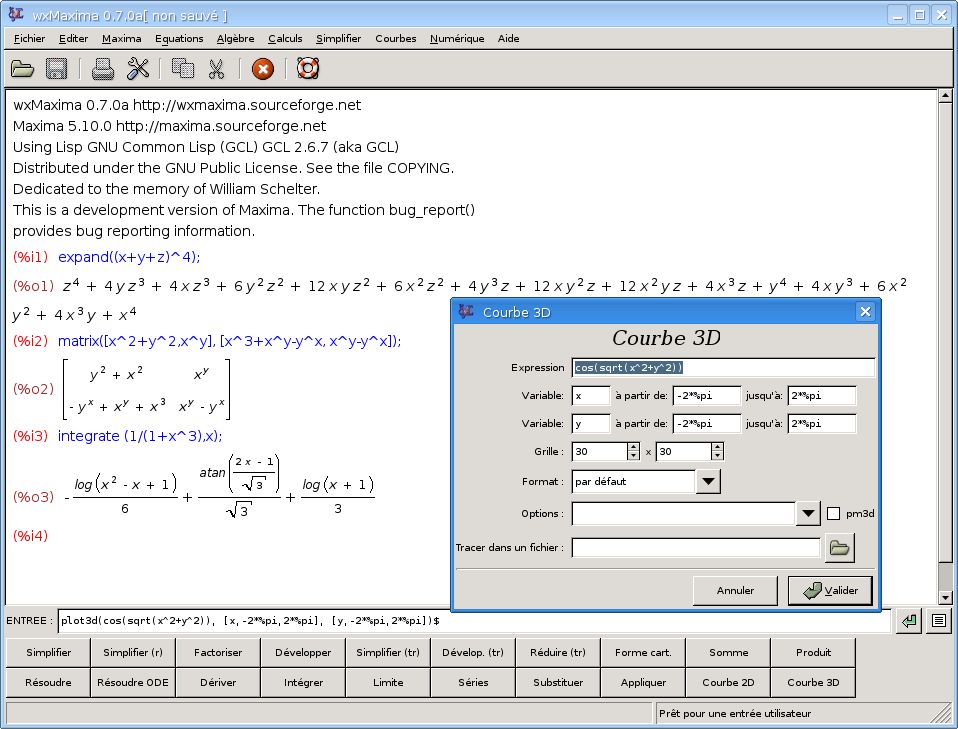 Interface graphique wxMaxima sous Linux Debian KDE